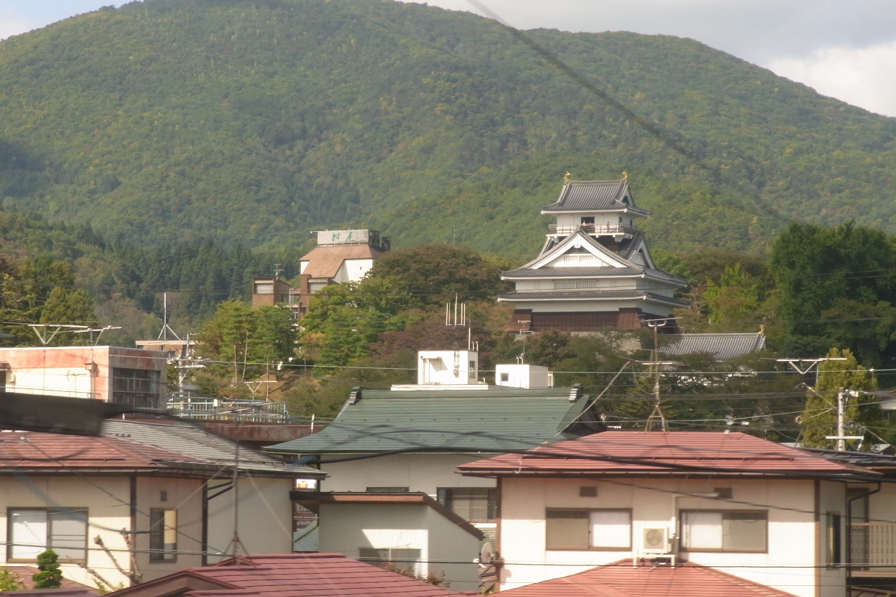 山形新幹線のつばさからかみのやま温泉駅のそばにある上山城です。